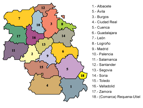 Mapa político del castellanismo.